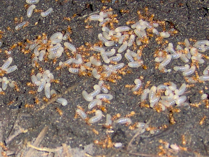 Lasius flavus workers and larvas